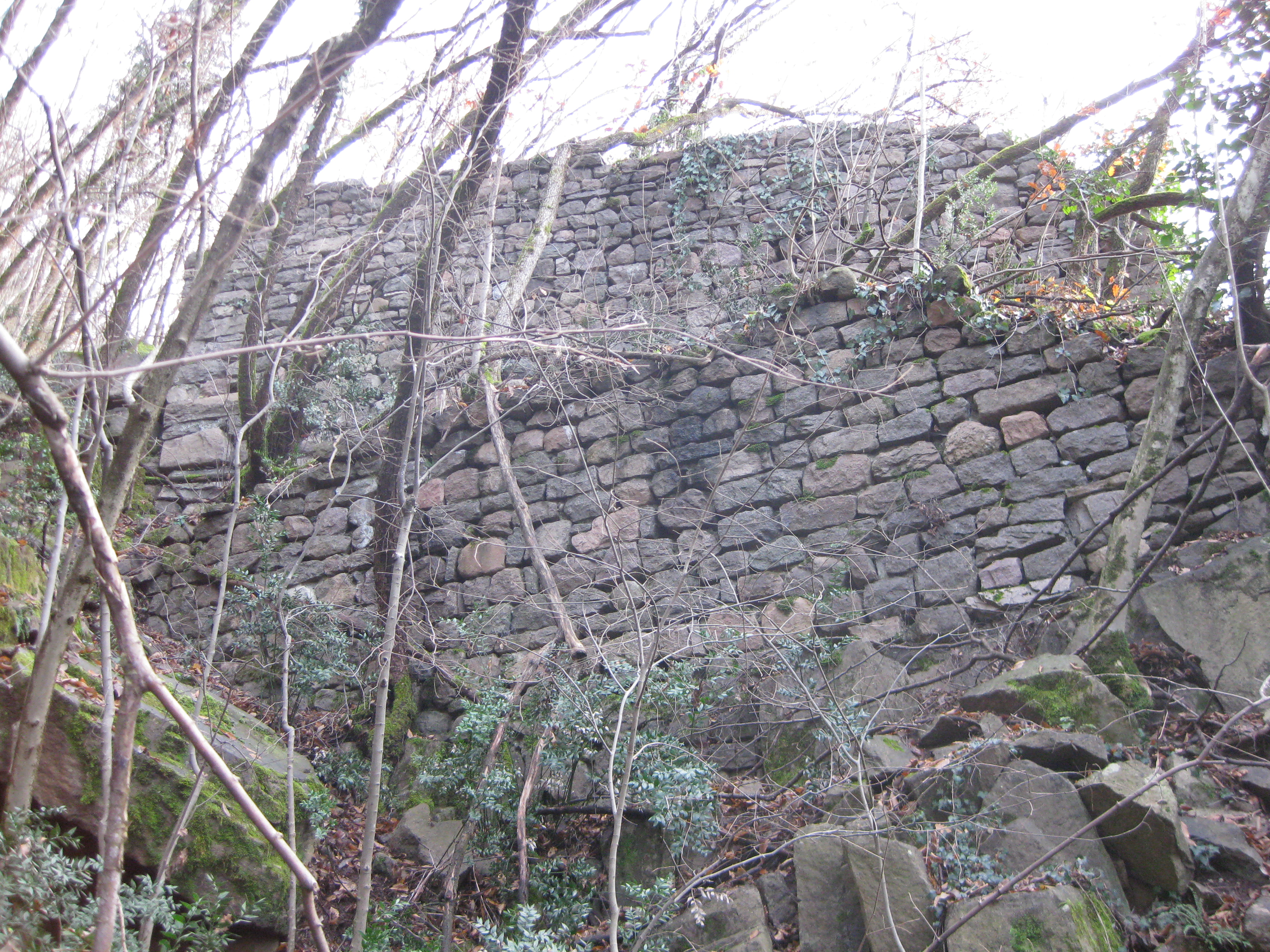 Der Tinzlturm (auch Turm an der Tinzlleiten oder Dinzlleiten genannt) ist eine heute schwer zugängliche Ruine bei St. Jakob in der Gemeinde Leifers in Südtirol. Geschichte und früherer Name des Gemäuers sind unbekannt, es scheint sich jedoch um einen Turm gehandelt zu haben, der einst die Kreuzung der alten Straße von Leifers nach Bozen mit dem inzwischen verwachsenen Steig zum hoch über dem Etschtal gelegenen Weiler Seit bewachte. Die Überreste des mittelalterlichen Gemäuers stehen heute unter Denkmalschutz. Dieses Bild zeigt einen Blick auf die nordseitige Mauer des Turms.